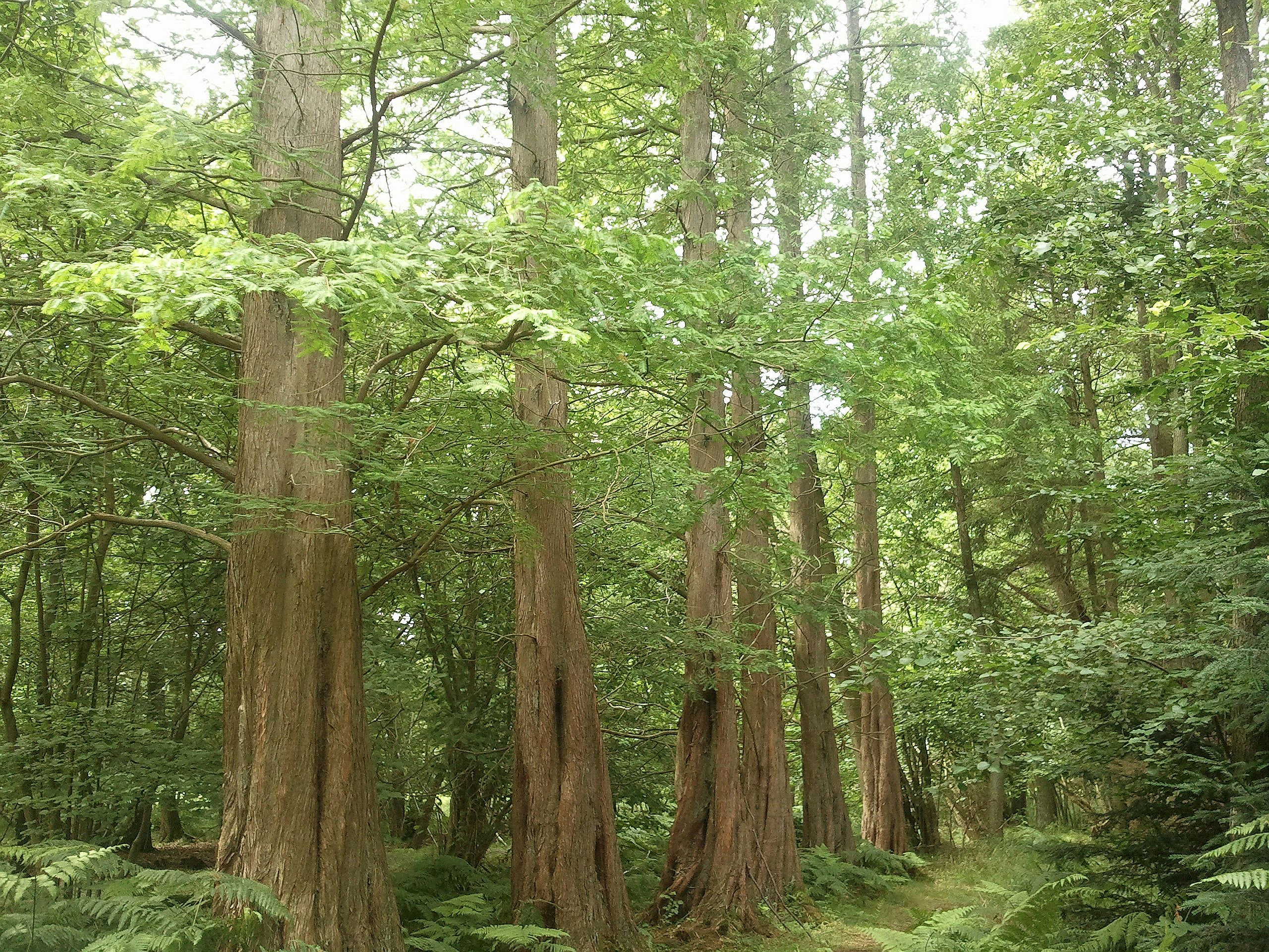 Zingster Urweltmammutbäume (Metasequoia glyptostroboides)